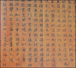 신숙주친필 몽유도원도서